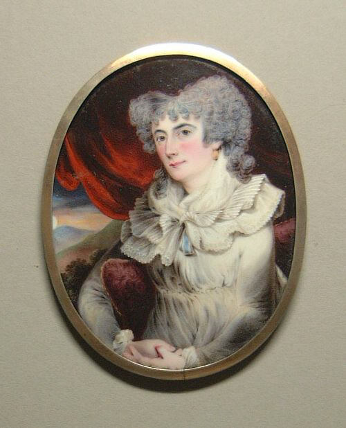 Painting, miniature; Paintings